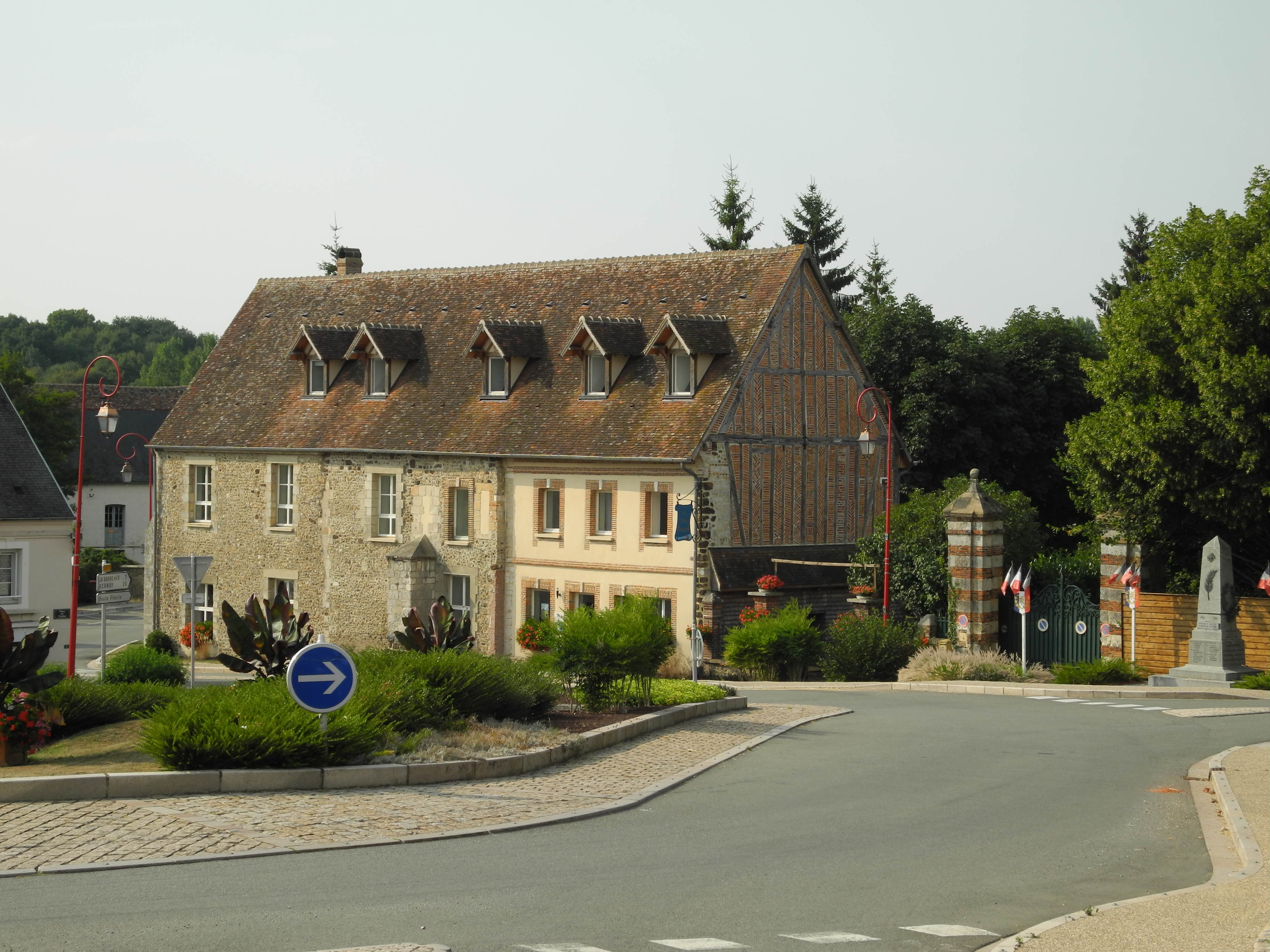 Ultime vestige de l'abbaye Notre-Dame de Lyre, aujourd'hui transformé en gîte. Une grande partie du film Le Trou Normand (réalisé par Jean Boyer, sorti en 1952 avec Bourvil et Brigitte Bardot) y a été tournée.